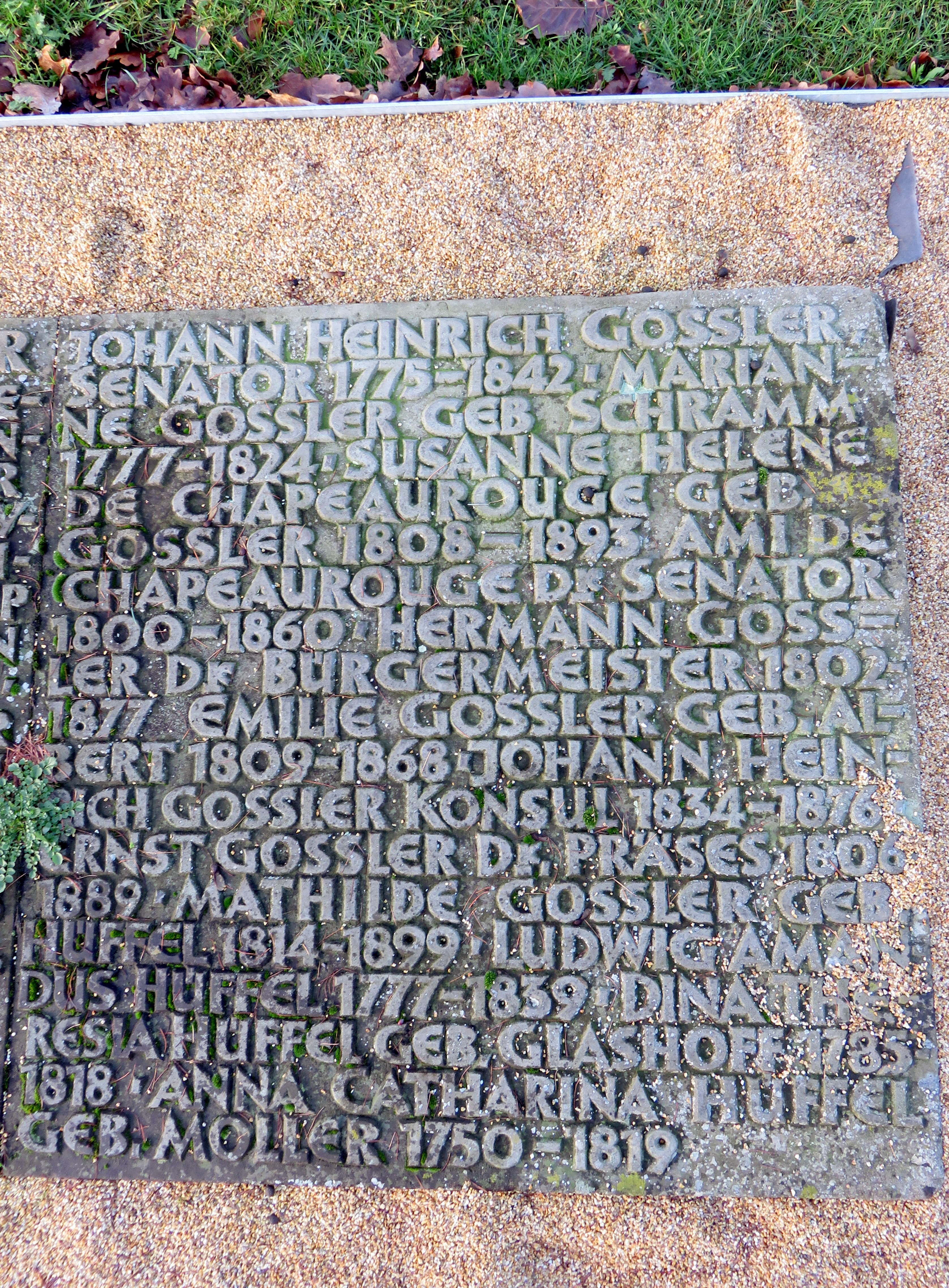 Doppel-Sammelgrab Familie Gossler im Bereich des Althamburgischen Gedächtnisfriedhofs auf dem Hamburger Friedhof Ohlsdorf zu Ehren von unter anderen : Elisabeth Berenberg, Ludwig Erdwin Seyler und seiner Ehefrau Anna Henriette Seyler geborene Gossler, Johann Heinrich Gossler, Hermann Gossler, Ernst Gossler und seiner Ehefrau Mathilde Gossler geborene Hüffel.